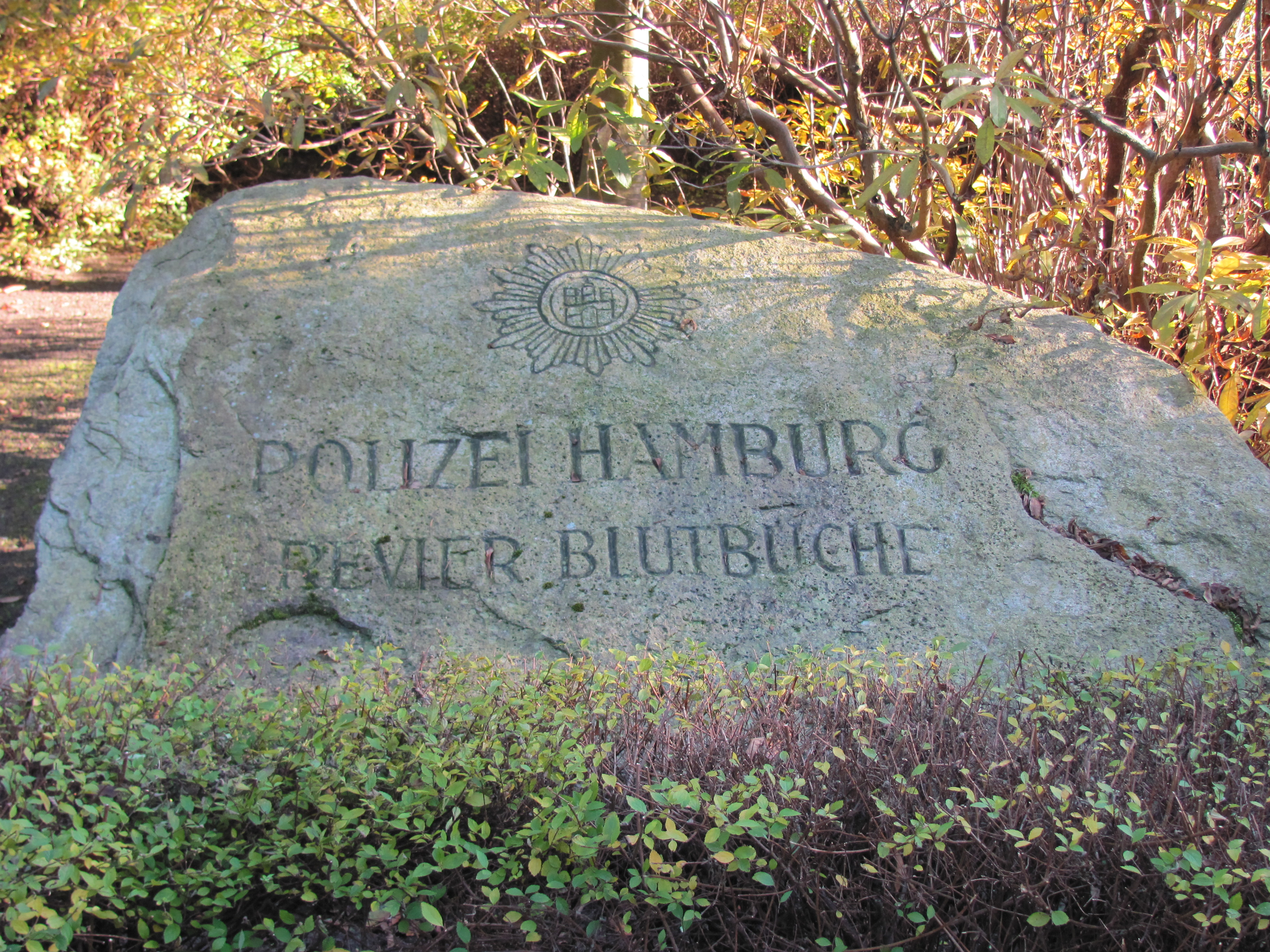 Stein im „Revier Blutbuche“ (Polizeigräber) auf dem Friedhof Ohlsdorf